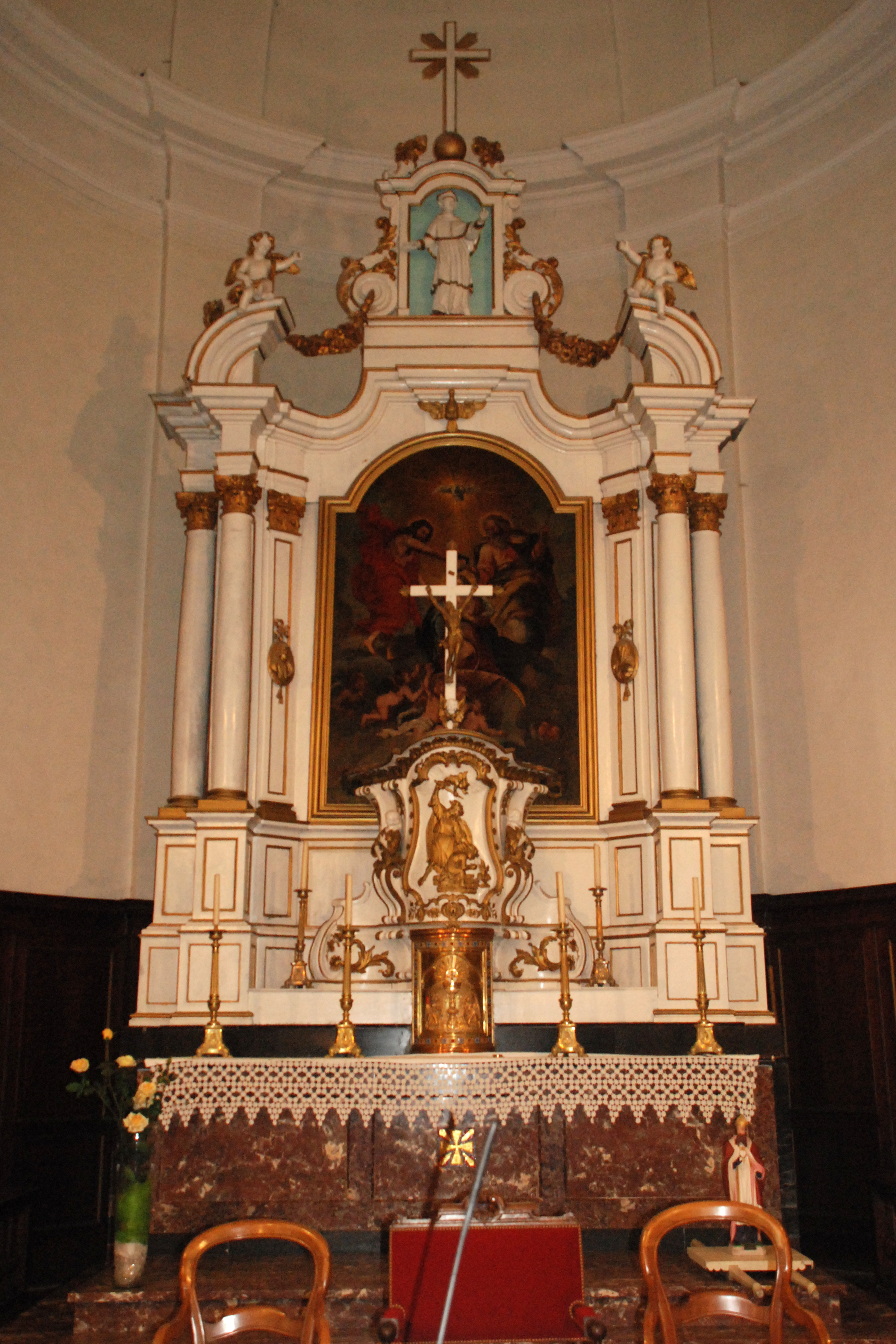 Belgique - Province de Namur - Viroinval - Nismes - église Saint-Lambert (1829)